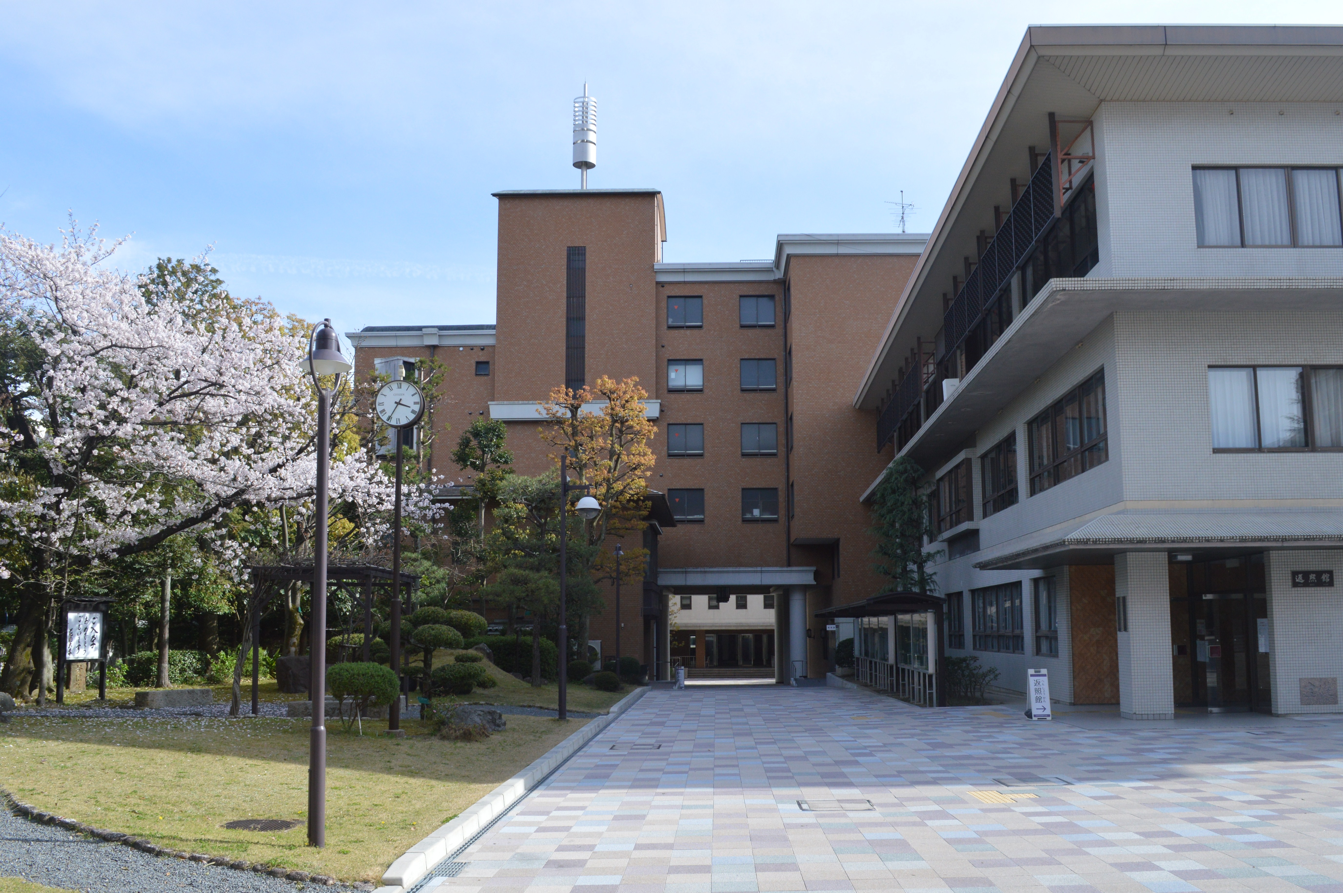 花園大学 栽松館（中央）・返照館（右）・中庭